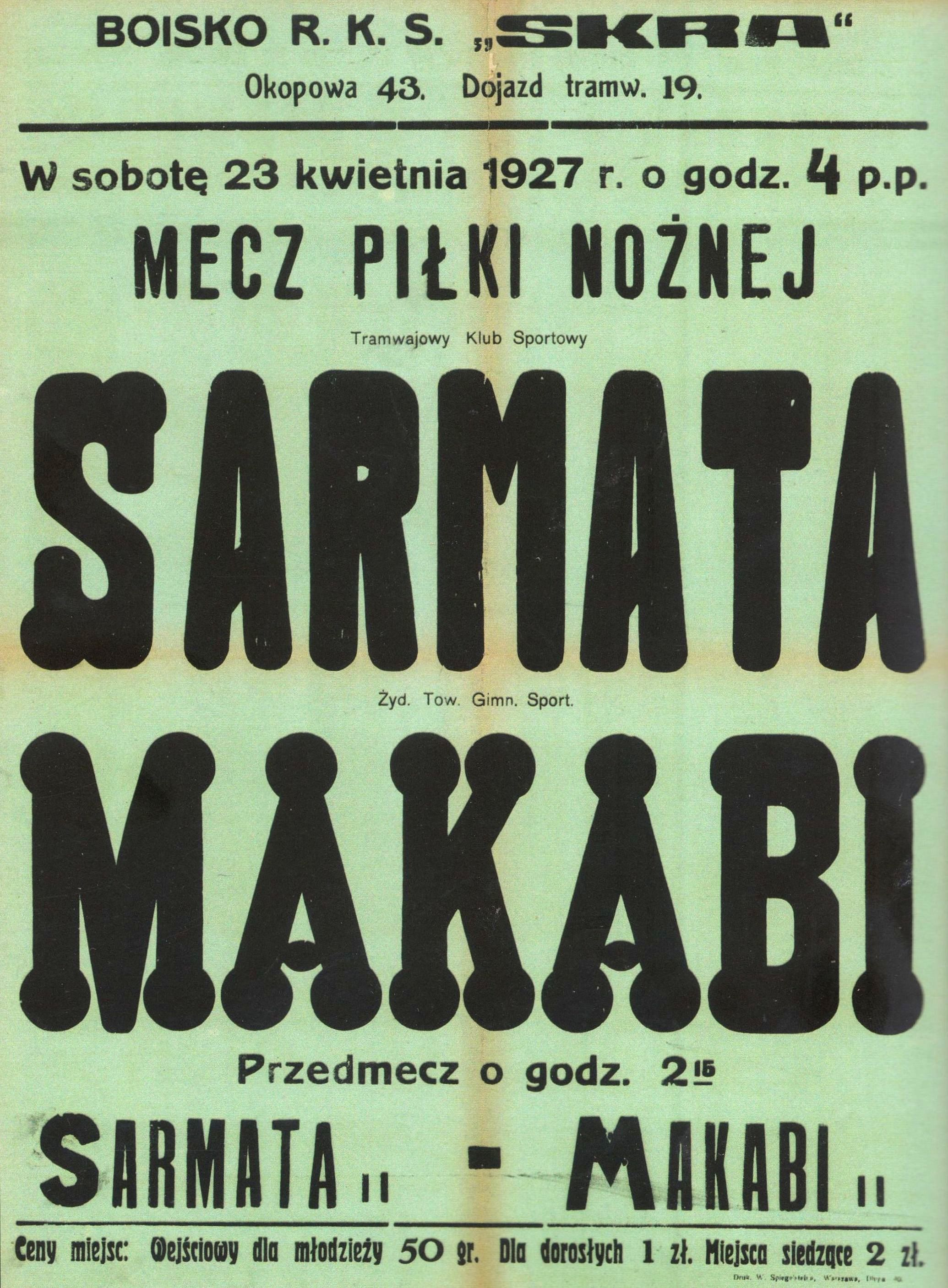 Plakat zapowiadający mecz piłki nożnej Sarmaty i Makabiego Warszawa na SKS Skra 23 kwietnia 1927